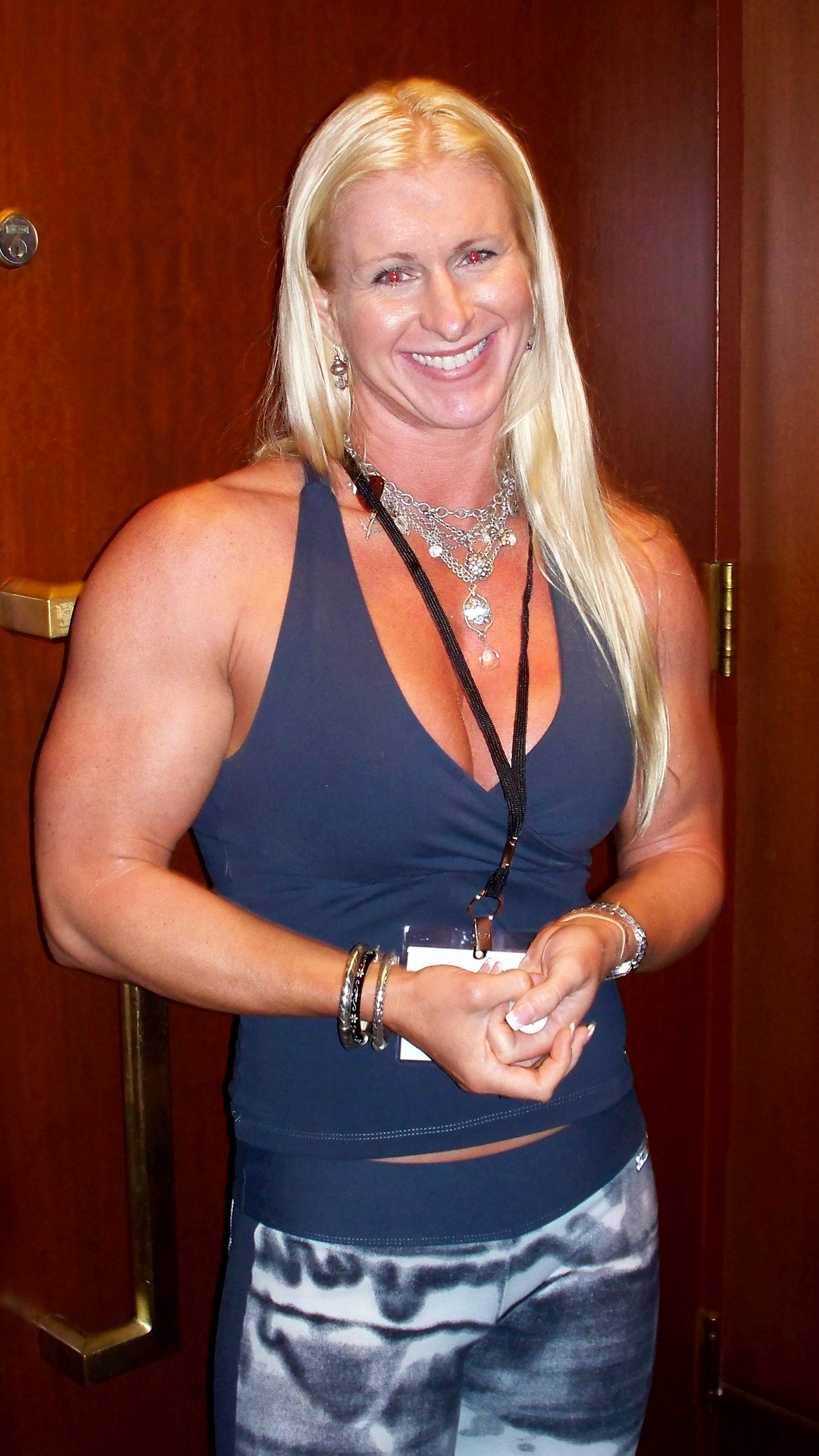 Debbie Patton, NPC Jr. Nationals